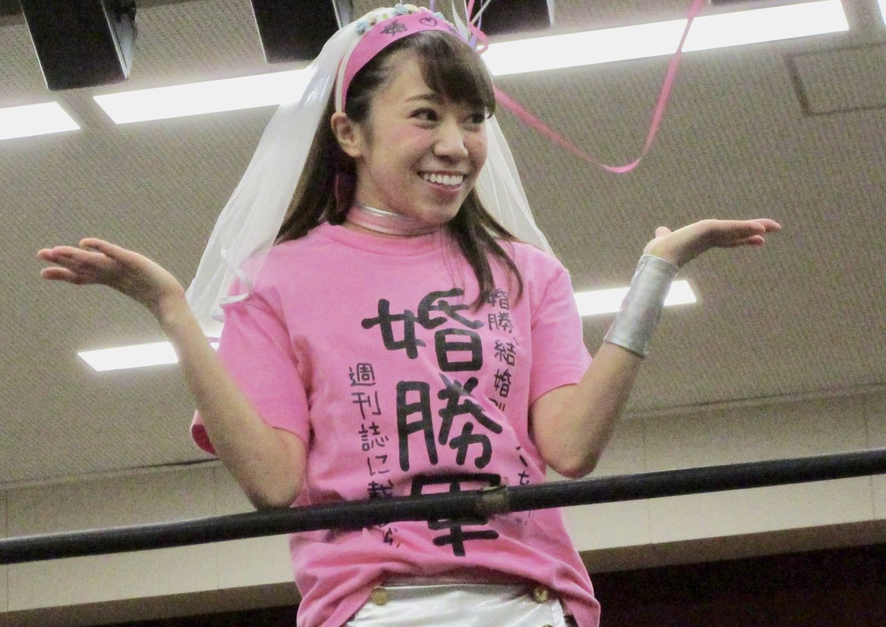 2017年9月30日大阪にて